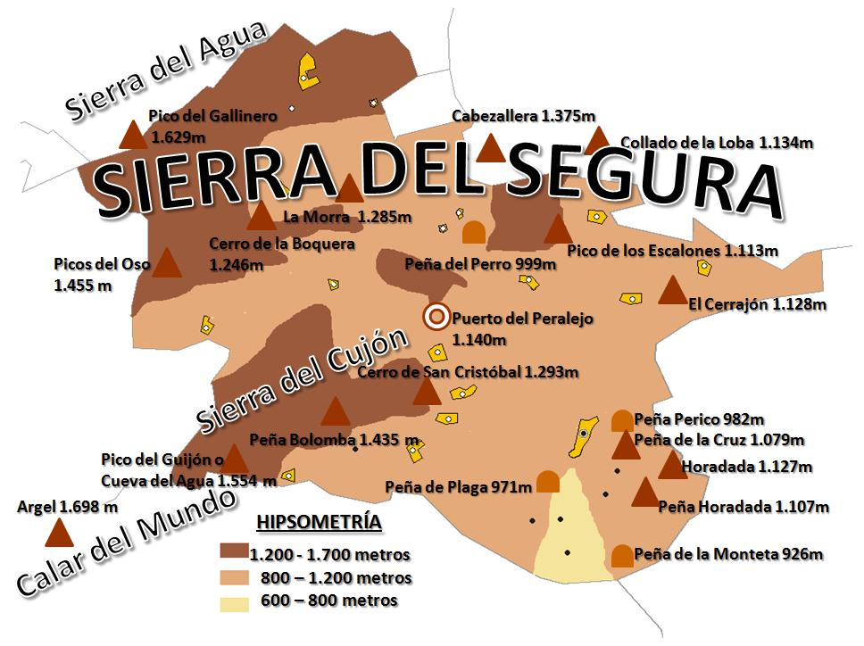 Mapa del relieve del municipio de Molinicos (Albacete)